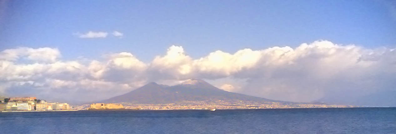 Foto scattata da me. Una vista del Vesuvio da Mergellina; si può anche vedere il Castel dell'Ovo.